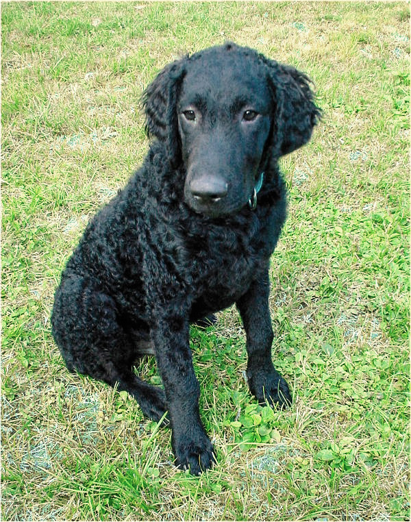 Junger Curly Coated Retriever, Rüde. Fotografiert im Sommer 2003 in Bever in der Schweiz